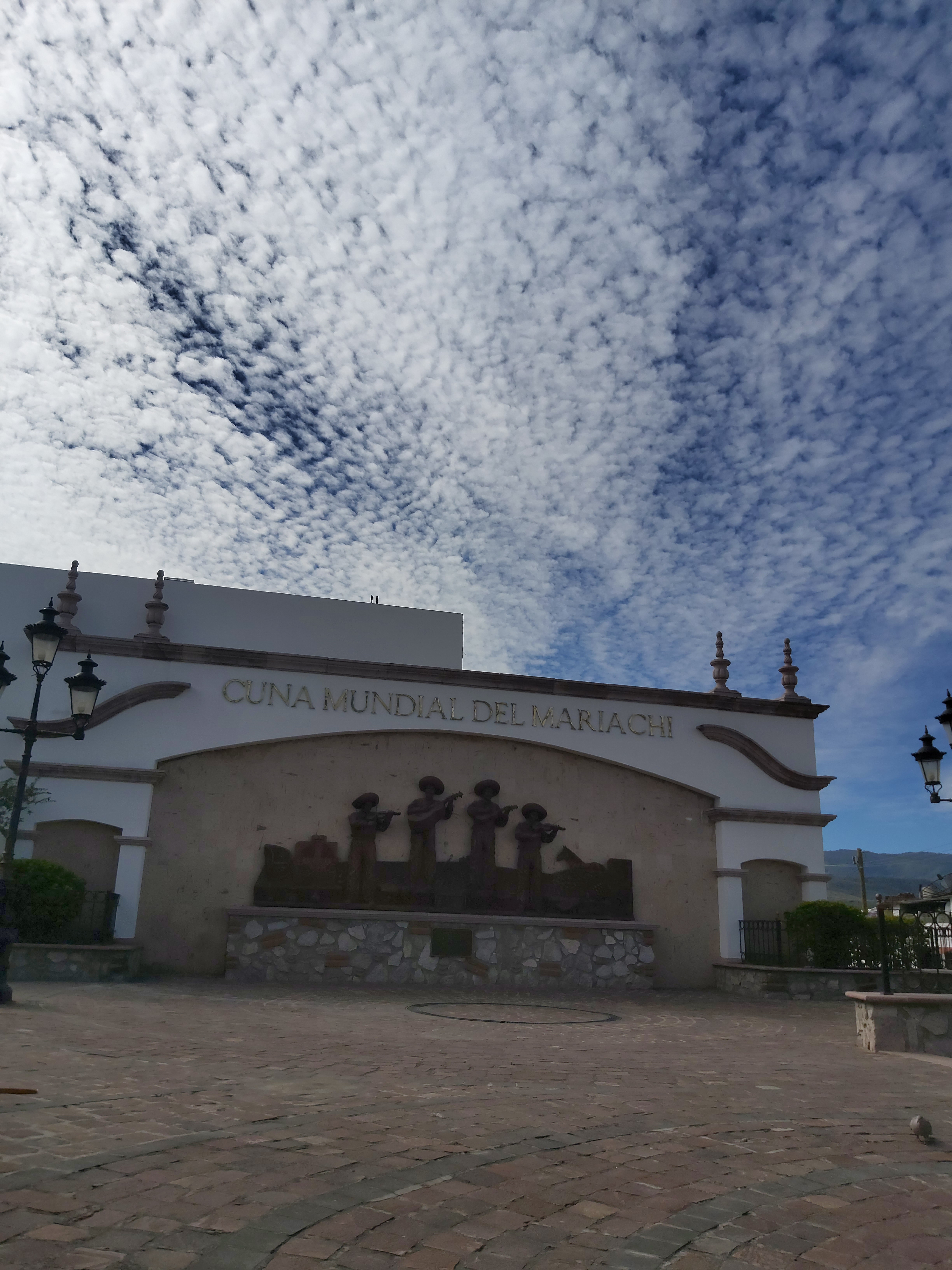 Plaza en la entrada de Cocula "Cuna Mundial del Mariachi" en el estado de Guadalajara, Jalisco